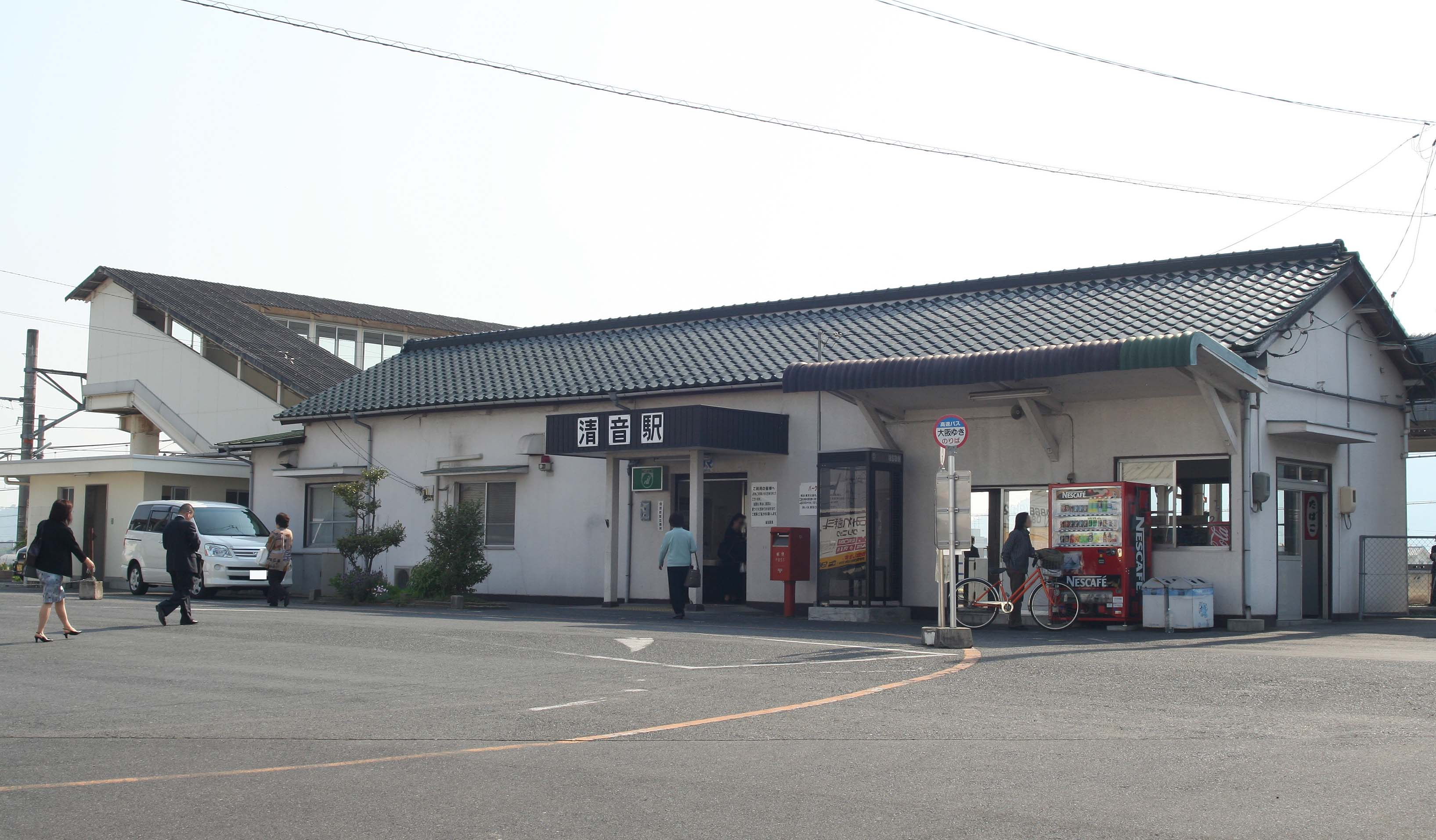 清音駅の駅舎（左側の駅舎がJR伯備線の清音駅。右側は井原鉄道の清音駅。）